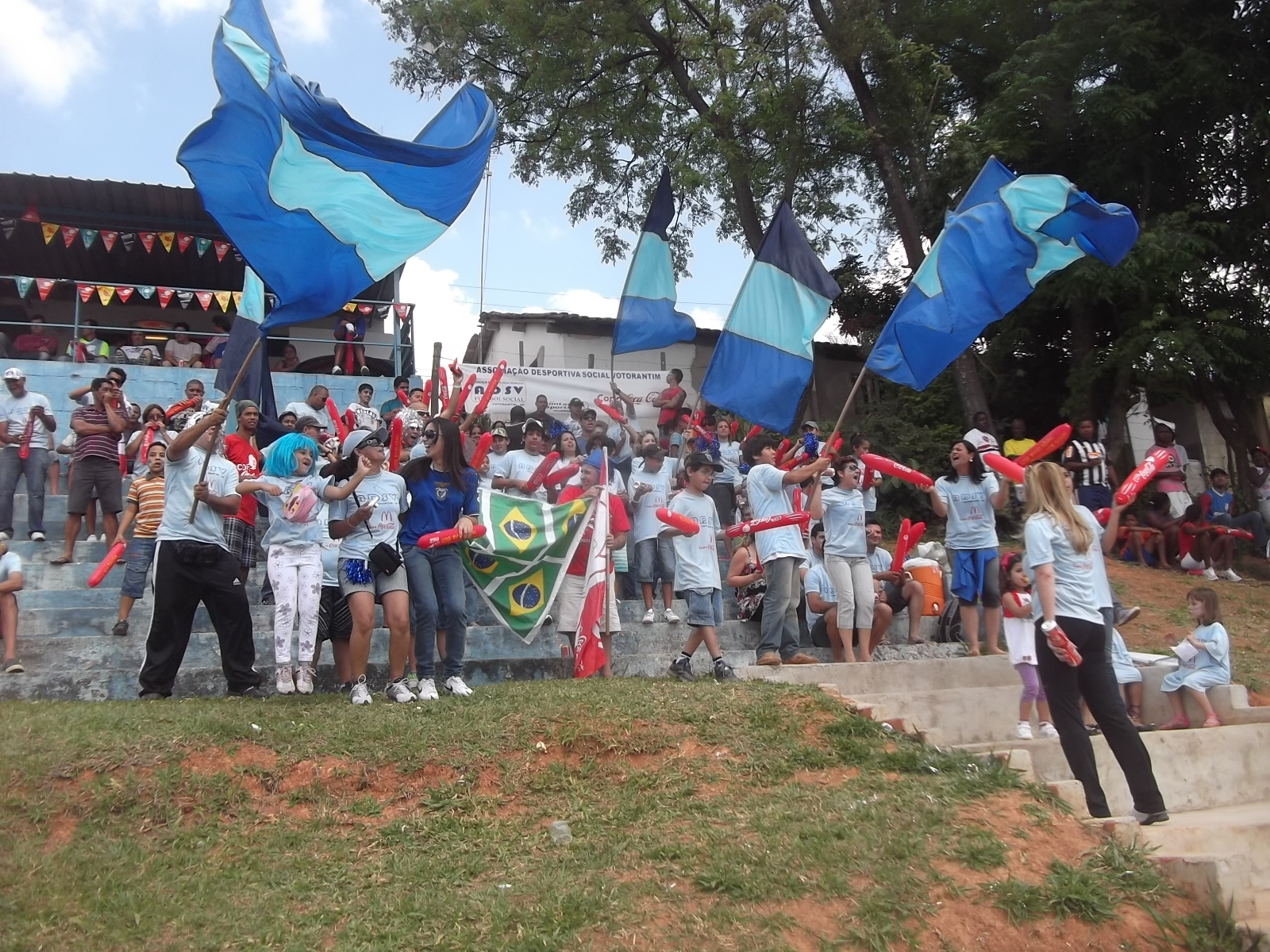 Torcida da Associação Desportiva Social Votorantim na Copa Coca-Cola